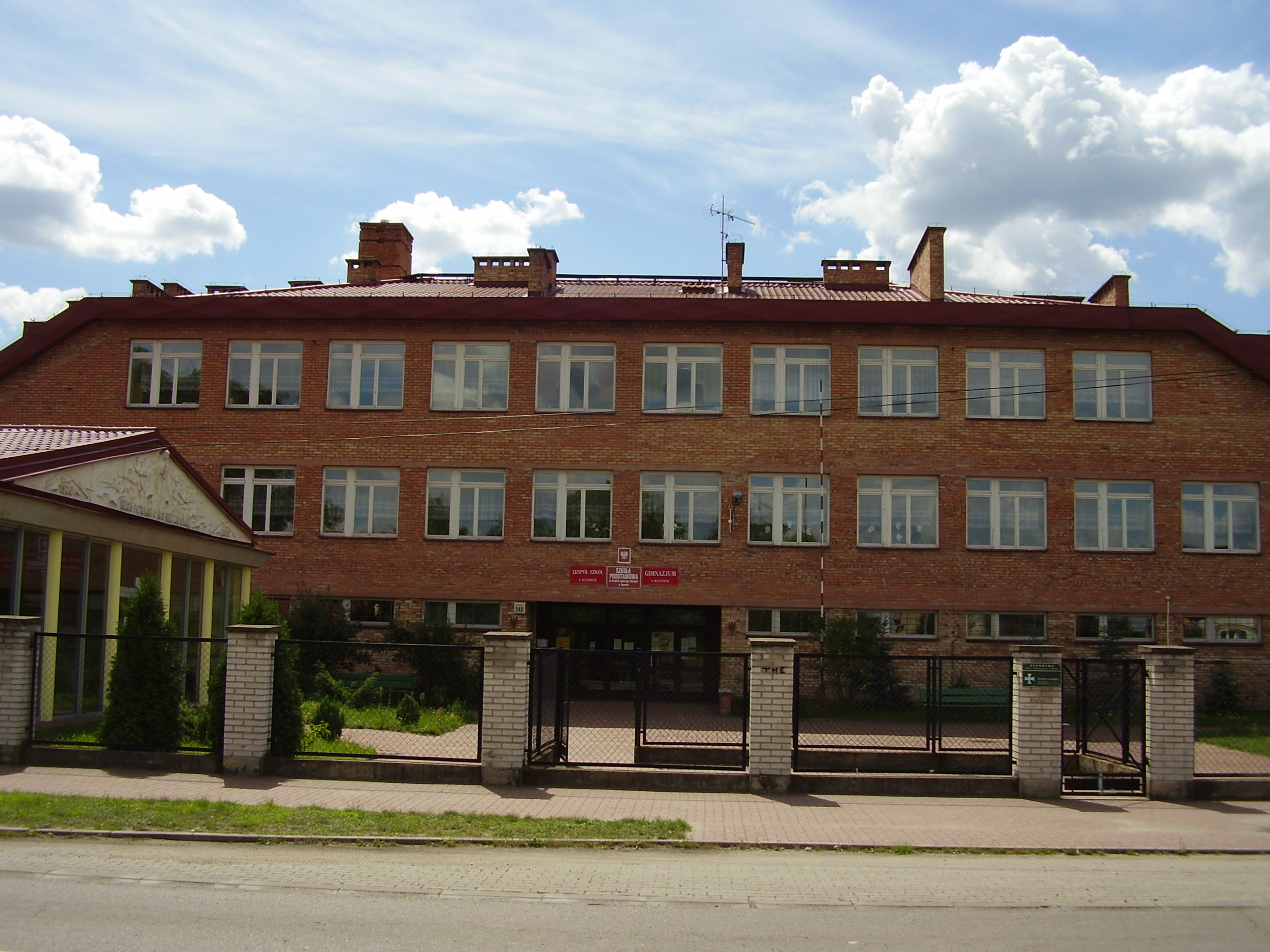 Zespoł Szkół w Ossowie. Po lewej pawilon historyczny.